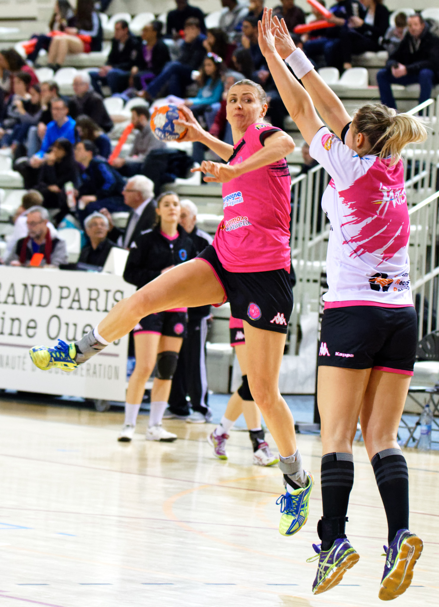 Rencontre de championnat entre Issy Paris Hand et Dijon. A Issy Les Moulineaux, le 5 mars 2016.